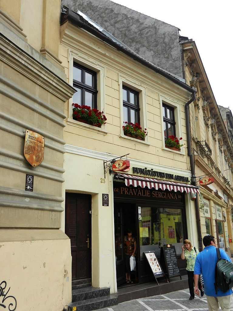 Casa monument istoric (Muresenilor 23)